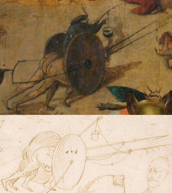 Comparaison de détails entre La Tentation de saint Antoine de Madrid (en haut) et un dessin conservé à Oxford (en bas).